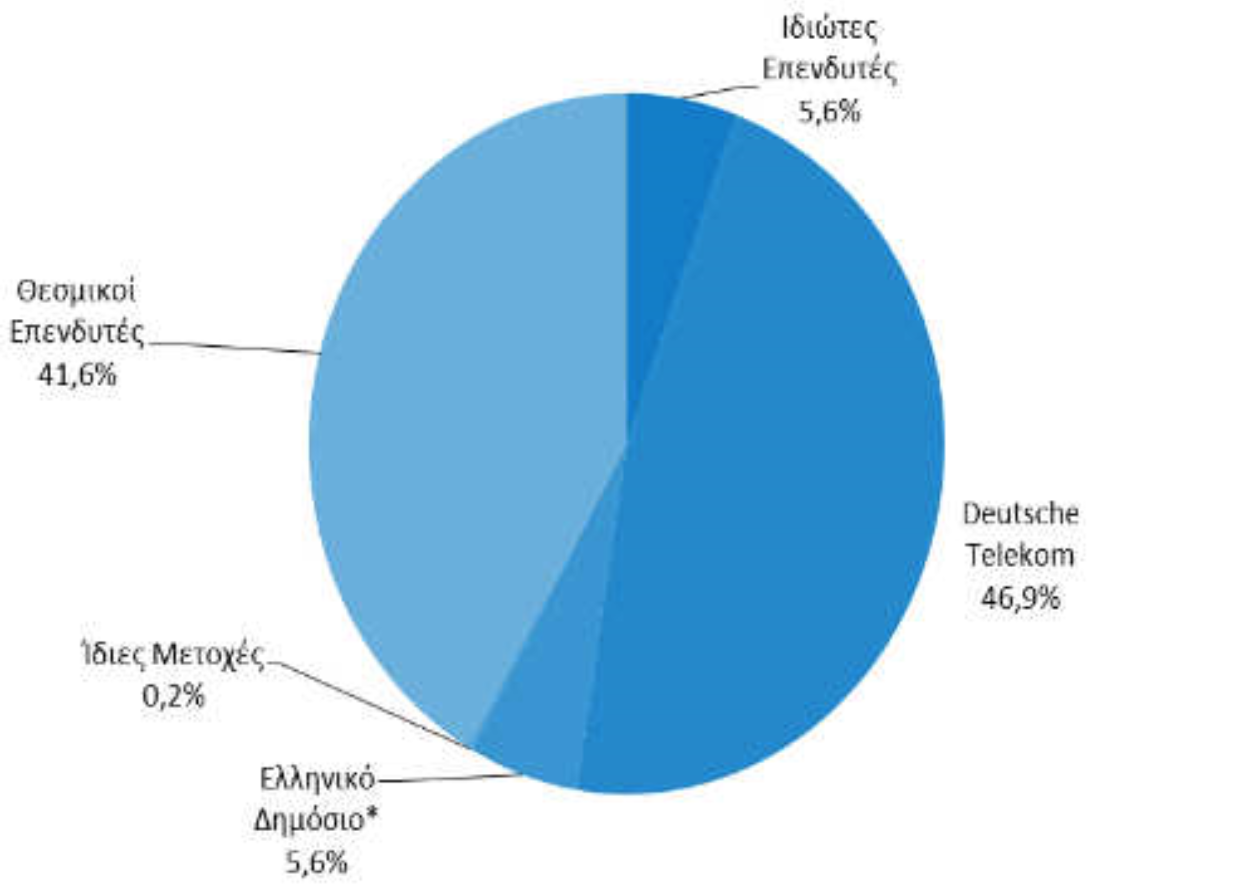 Συμπεριλαμβάνονται δικαιώματα ψήφου ύψους 4,54% που κατέχει μέσω του Ενιαίου Φορέα Κοινωνικής Ασφάλισης (ΕΦΚΑ) το Ελληνικό Δημόσιο.